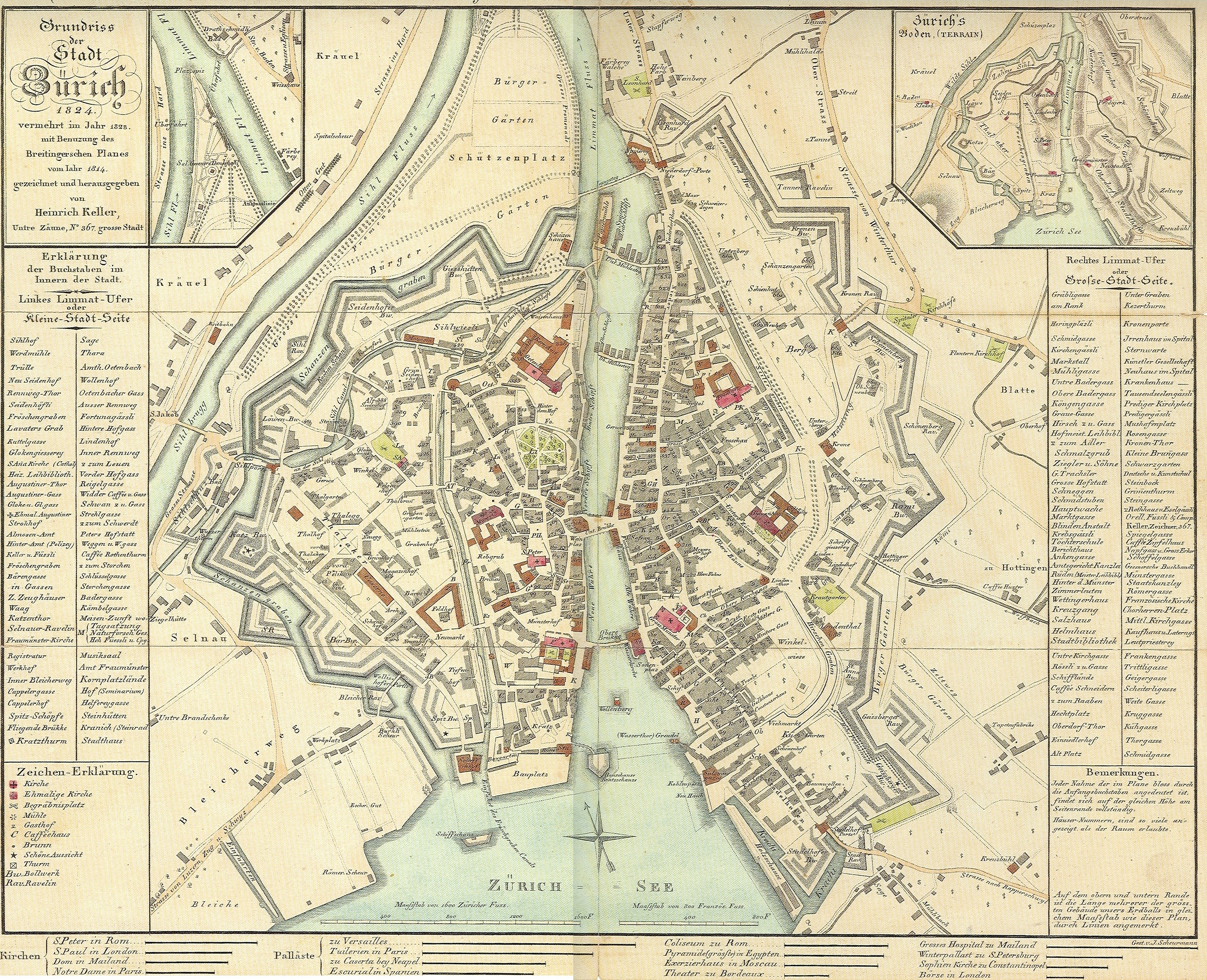 Kellerplan der Stadt Zürich von 1824, gezeichnet von Heinrich Keller (*11. Oktober 1778 - gest. 18. September 1862)